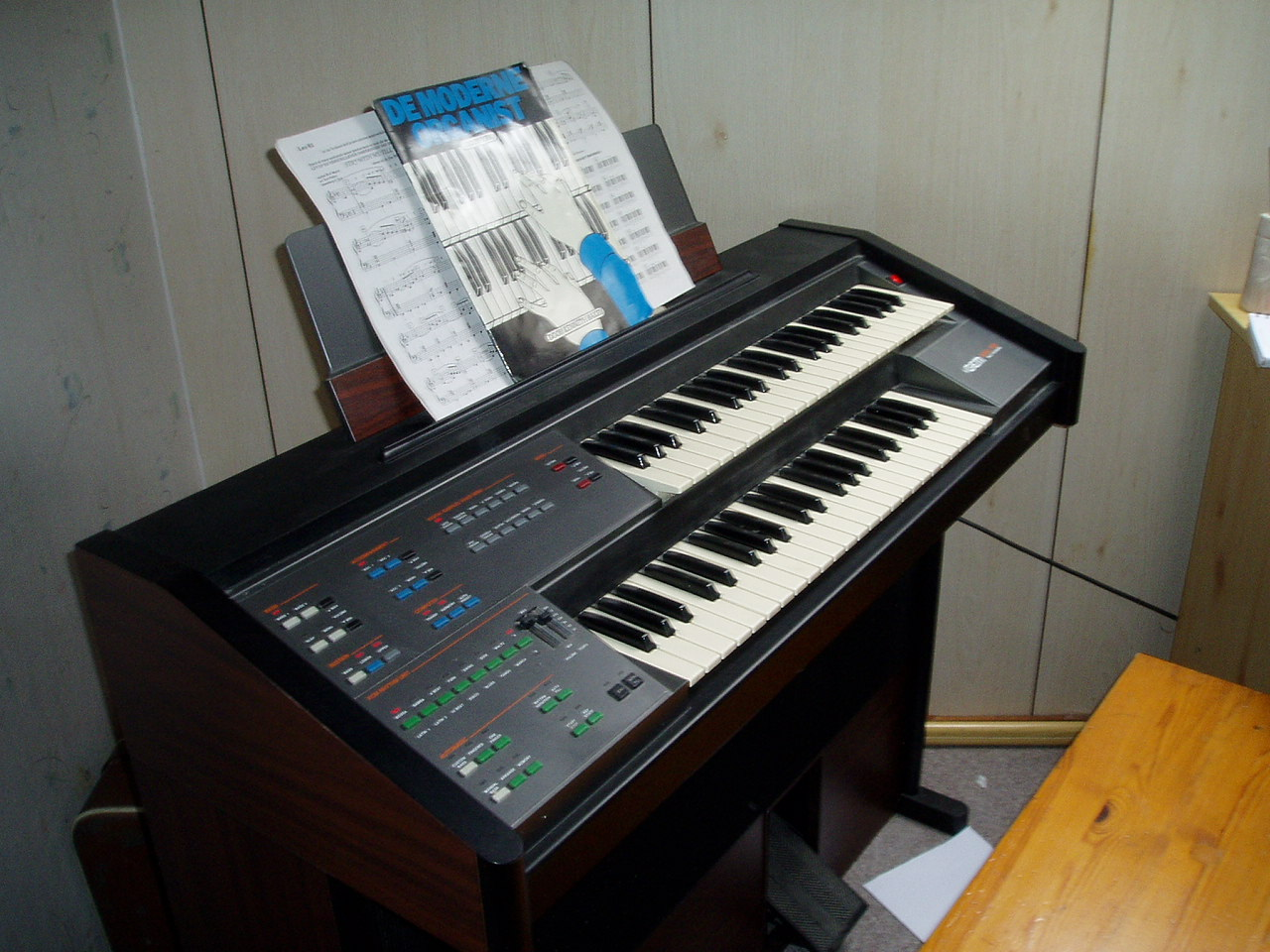 Dit is mijn eigen eletronisch orgel, een General Music GEM MK-10. Danielm